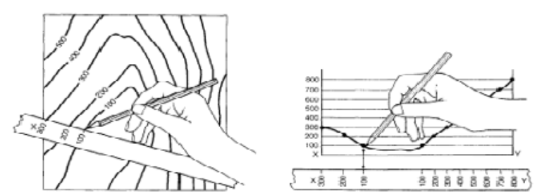 Zehar ebaki bat egiten